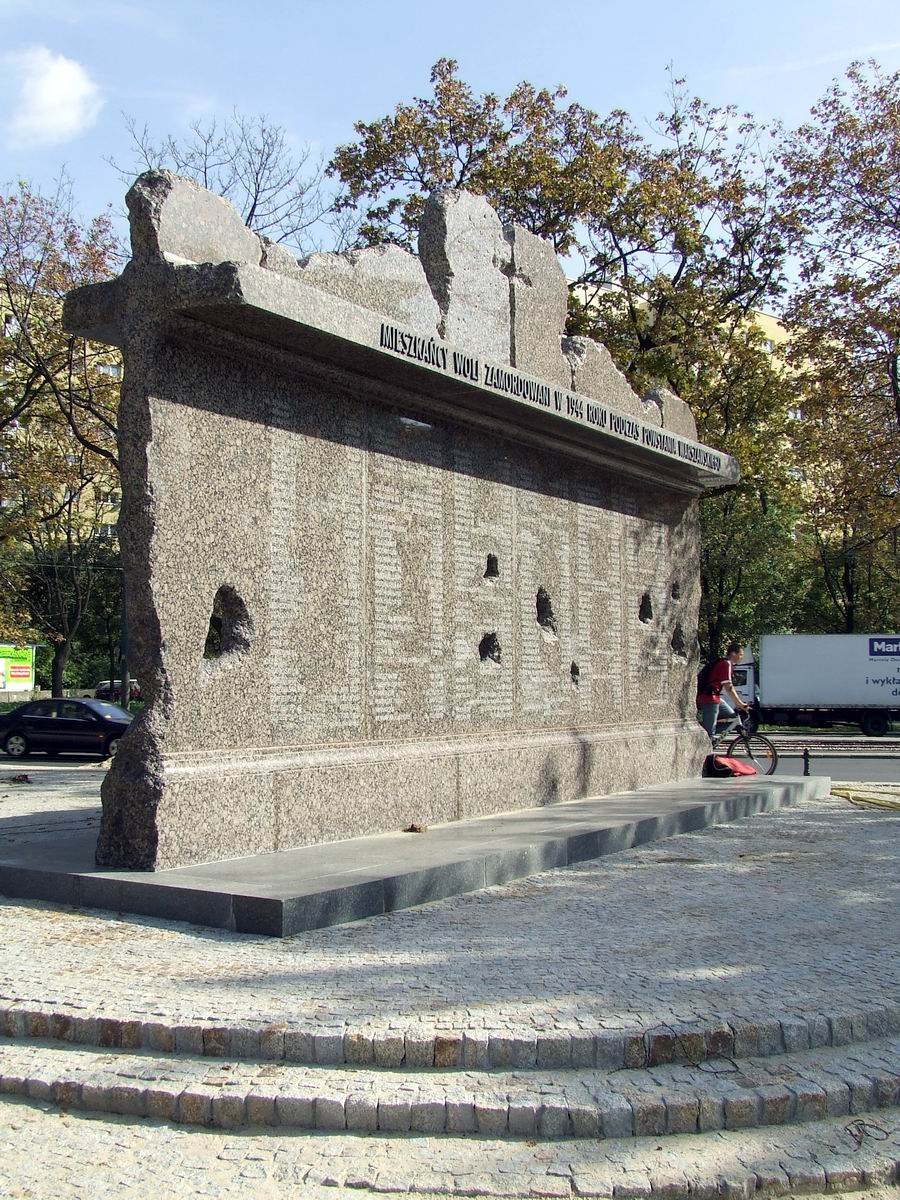 Pomnik upamietaniający miejsca masowych egzekucji w czasie rzezi Woli